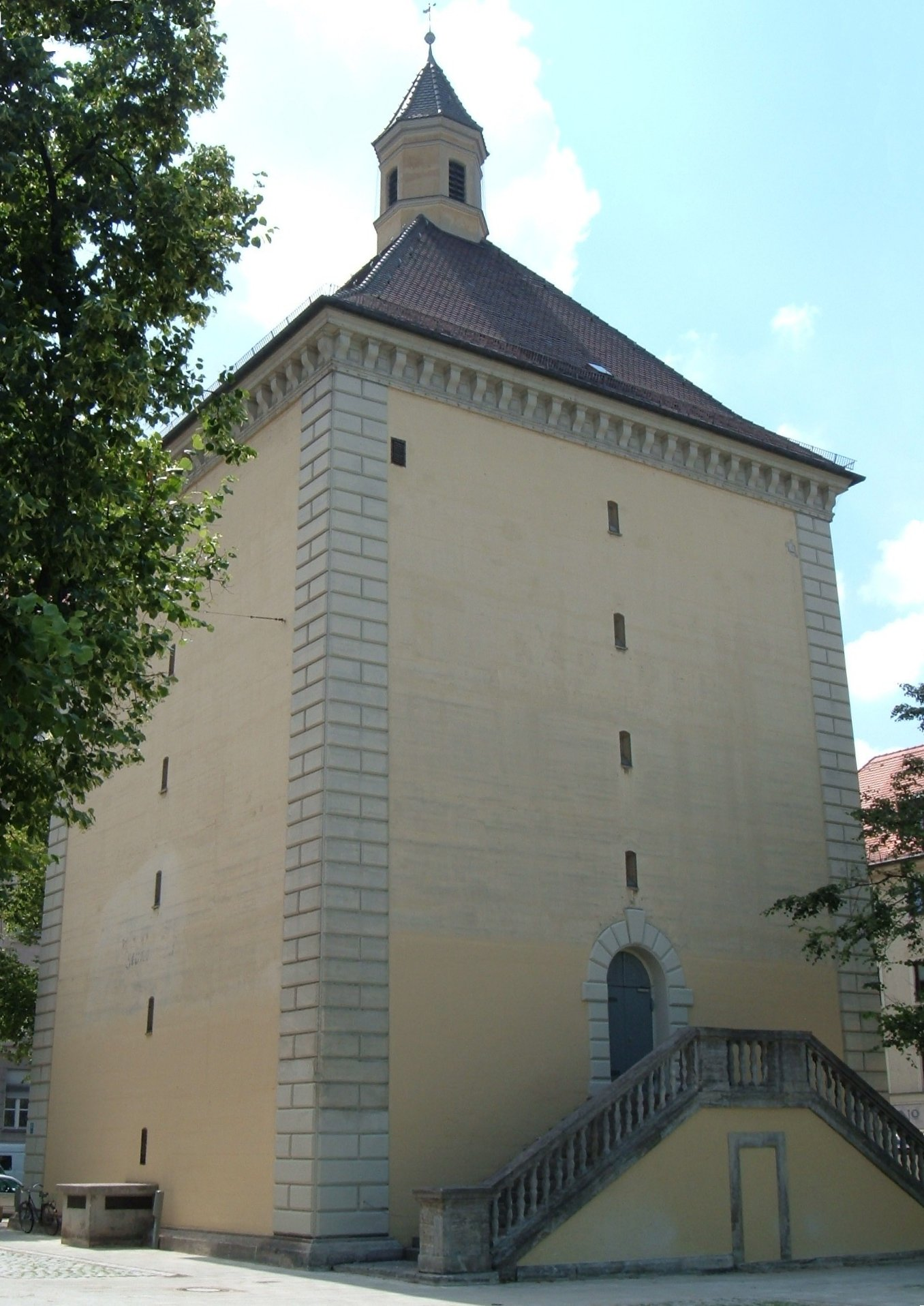 Hochbunker Blumenstraße/Corneliusstr., München